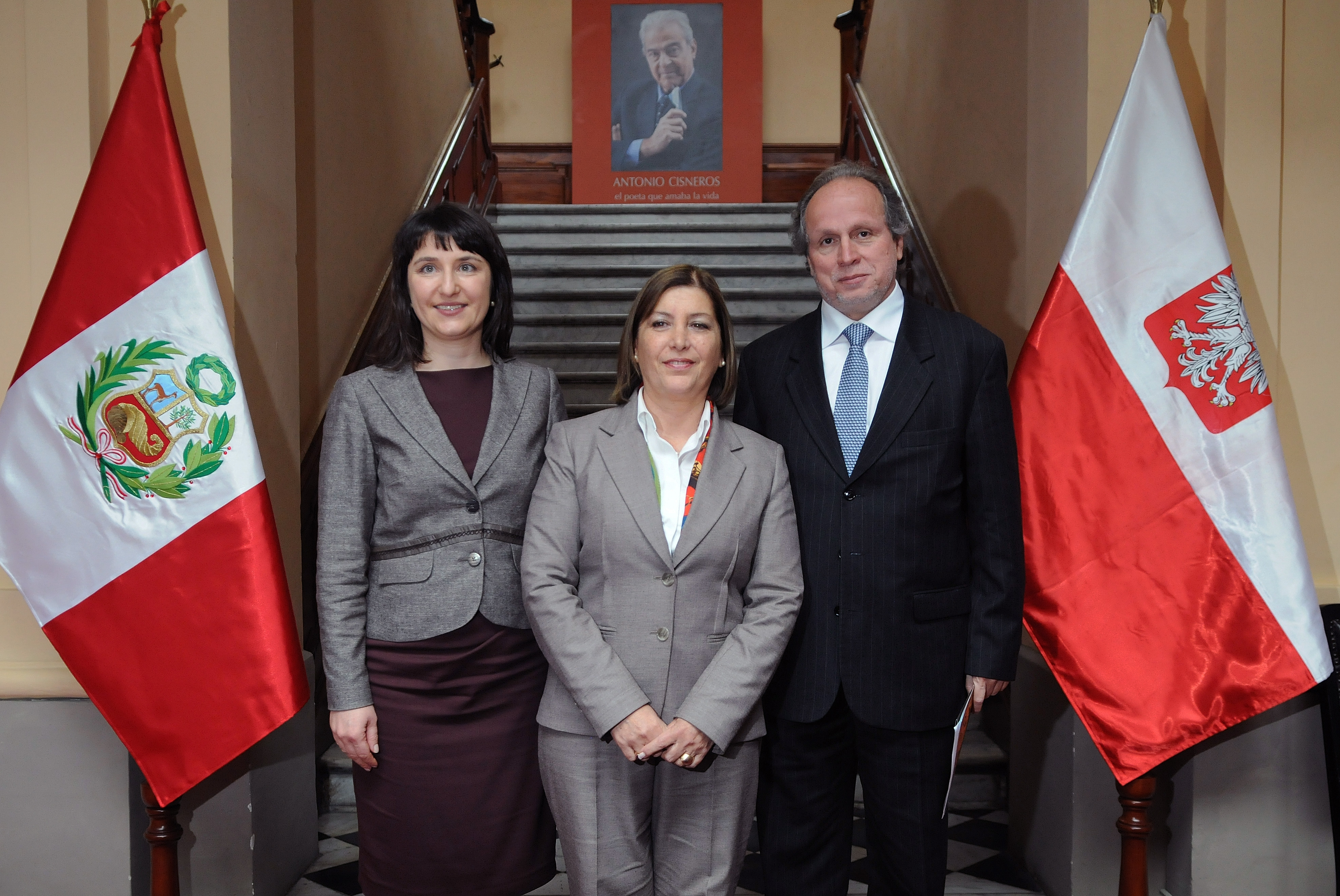 La Ministra de Relaciones Exteriores, Eda Rivas Franchini, presidió hoy en el Centro Cultural Inca Garcilaso de la Cancillería la ceremonia de conmemoración por el 90 Aniversario del Establecimiento de Relaciones Diplomáticas entre el Perú y Polonia. Al evento asistieron, entre otros, la Embajadora de Polonia en el Perú, Izabela Matusz; altos funcionarios del gobierno; miembros de la Liga Parlamentaria de la Amistad Perú-Polonia; integrantes del Cuerpo Diplomático acreditado en el Perú; y representantes de los sectores culturales, académicos y empresariales. Sigue leyendo la nota en nuestra Web: bit.ly/1aduVgD